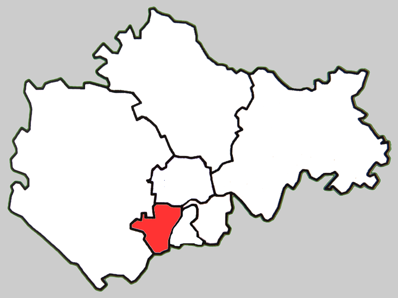 蚌埠市禹会区地图